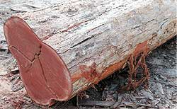 tora de andiroba